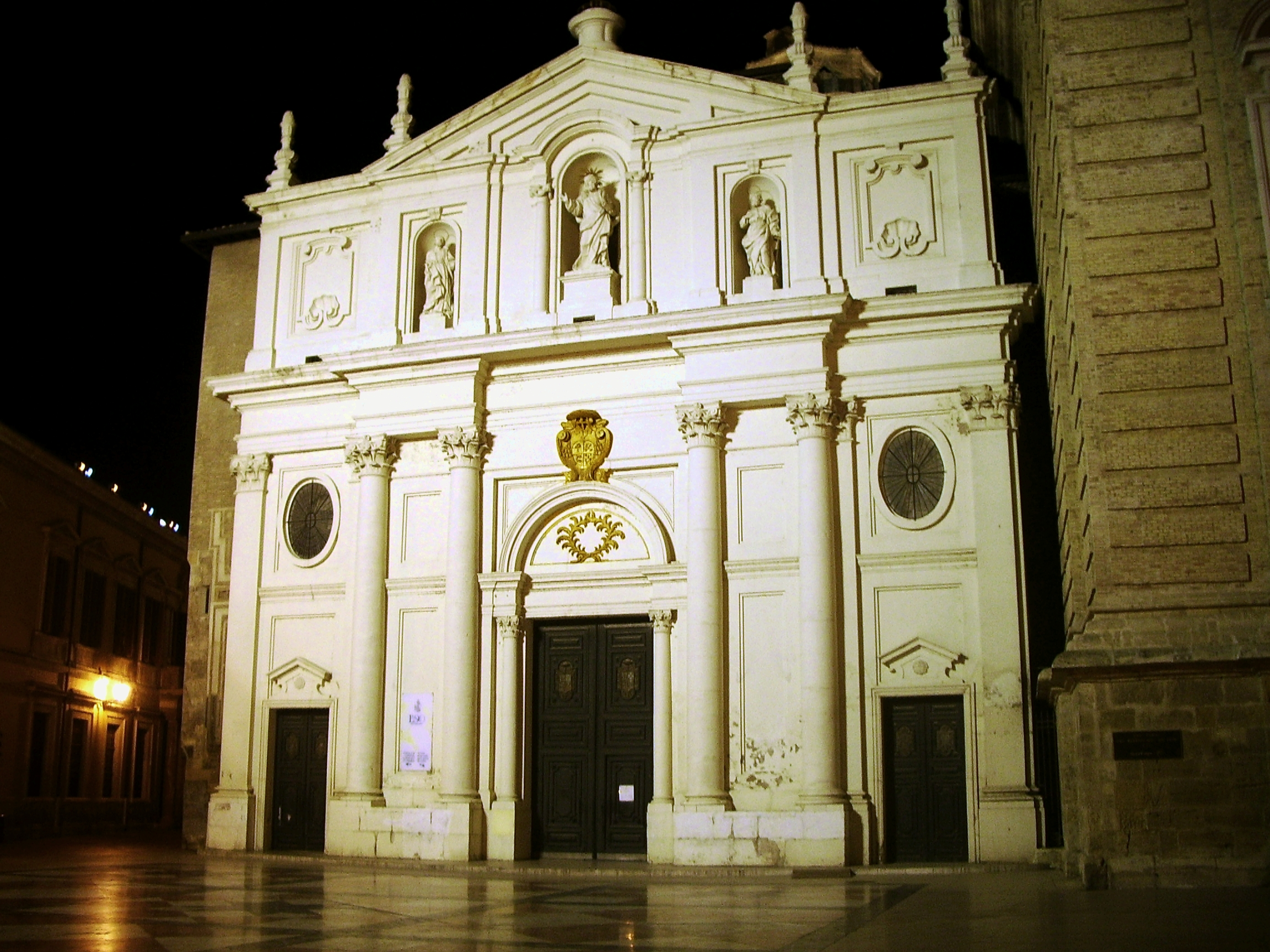 Fachada de La Seo de Zaragoza de noche.